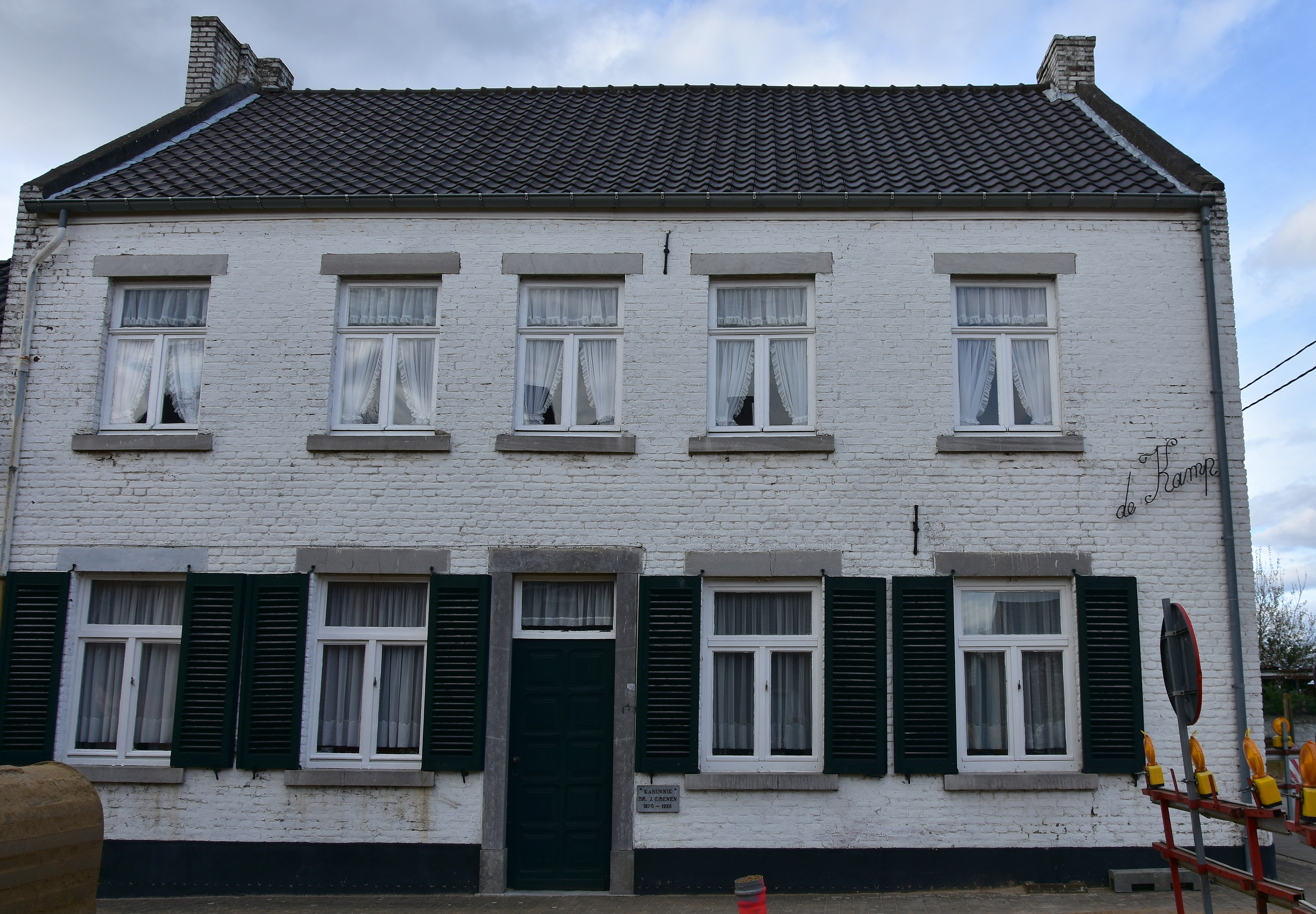 Elen Zandstraat 18 (71385) geboortehuis kannunik Coenen 18 16-03-2020